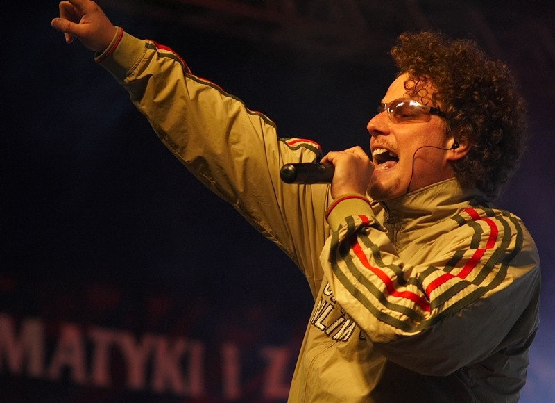 Sidney Polak, Juwenalia w Rzeszowie (2007)